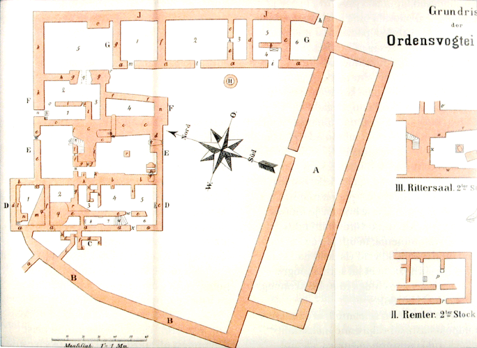 Pöide ordulinnuse ja algkiriku põhiplaan